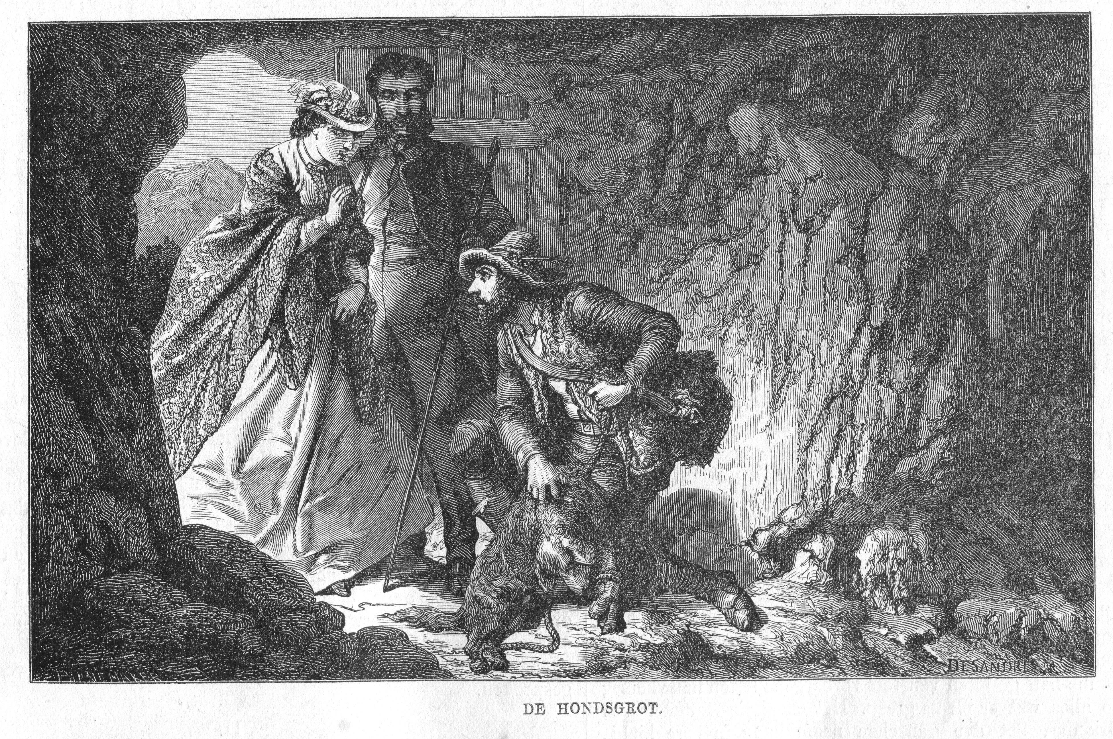 Kath. Illustratie 1869-1870 nr 14 p.105 gravure De Hondsgrot - Desandre